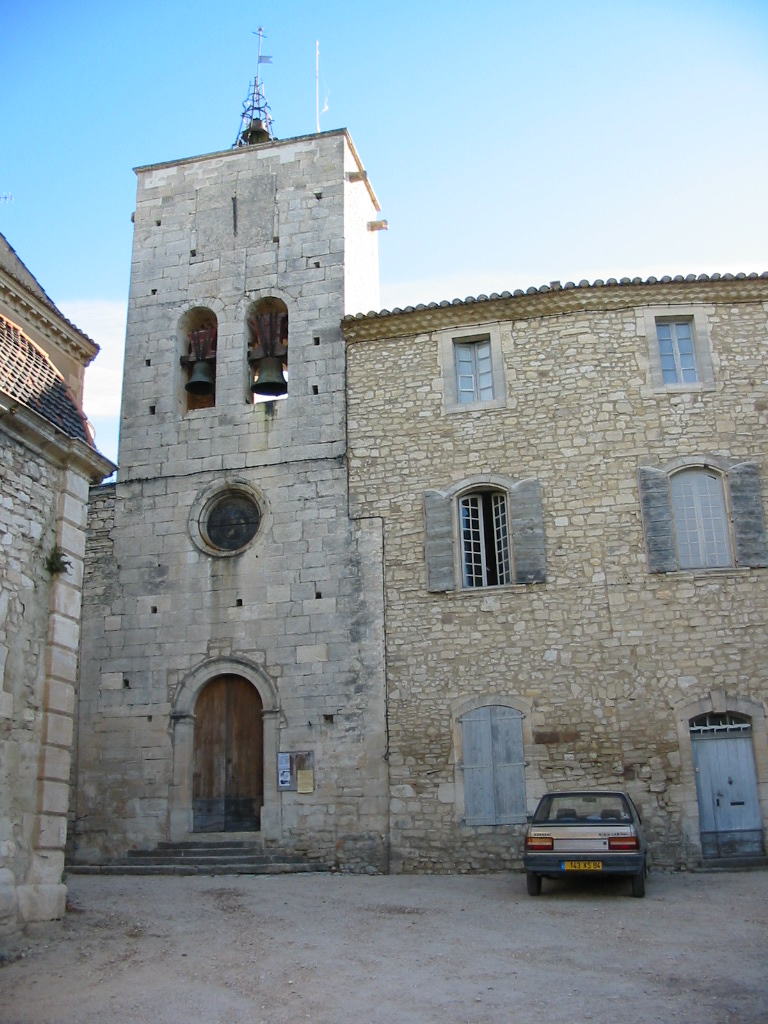 Eglise de Murs